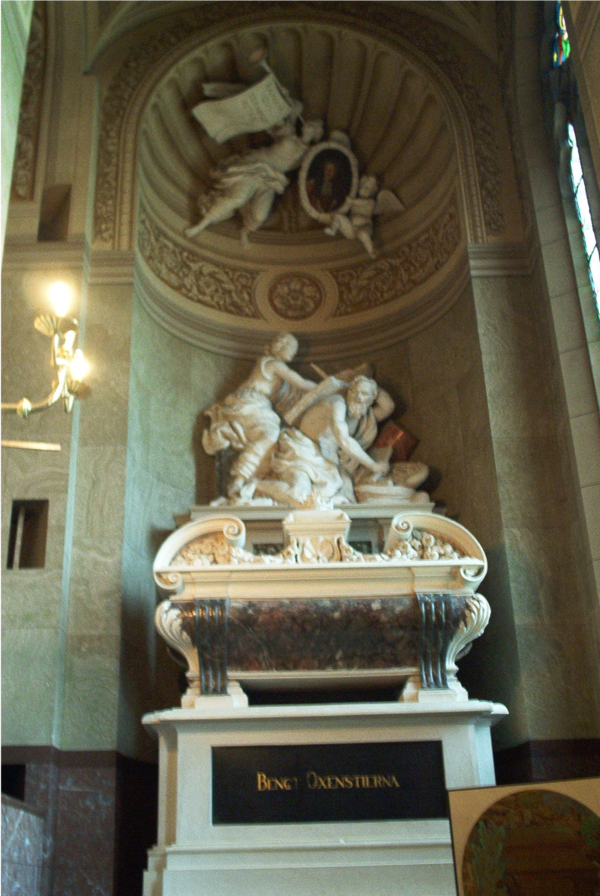 Uppsala Cathedral, grave of Bengt Oxenstierna.